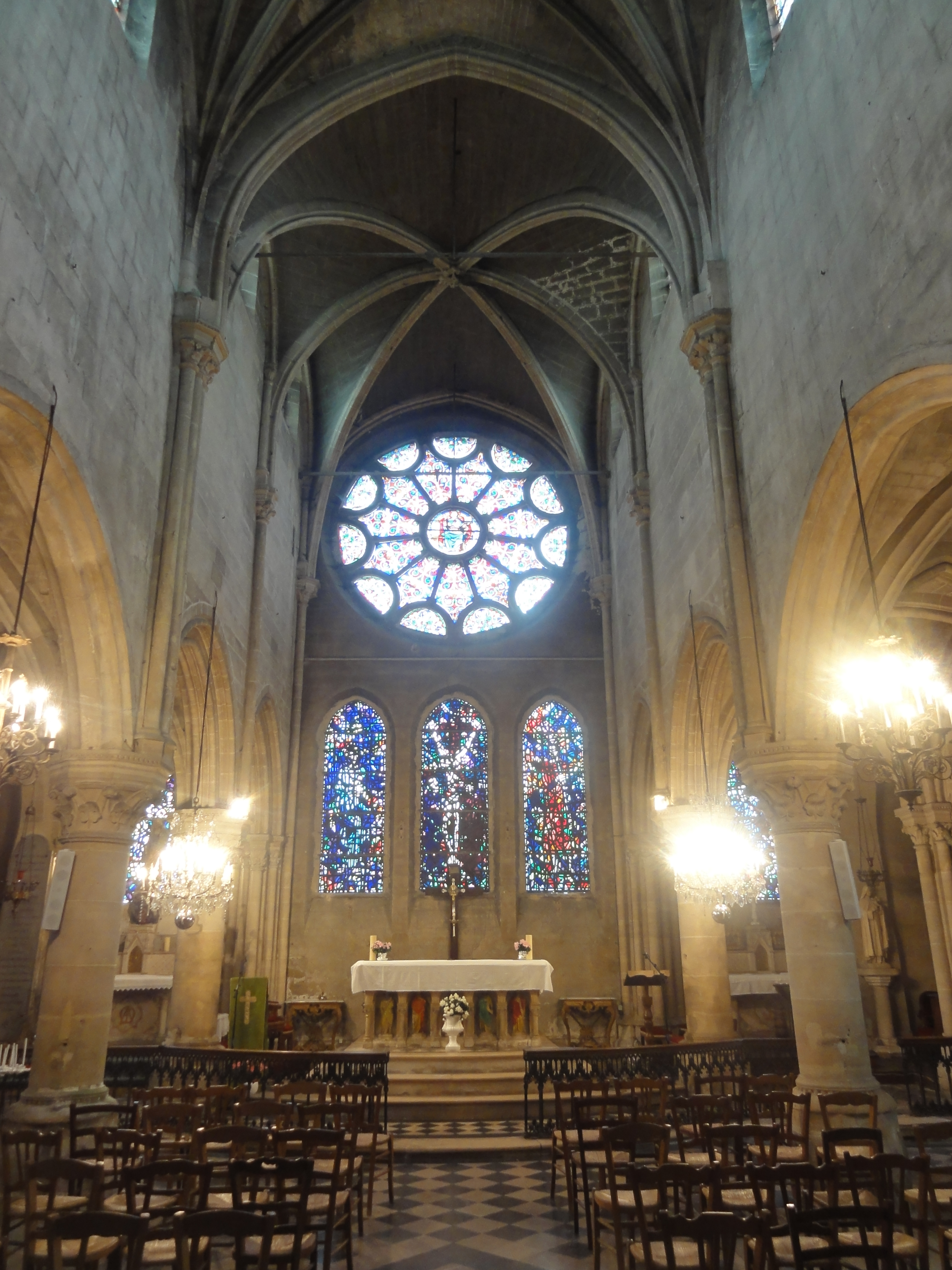 Nef, vue vers l'est.